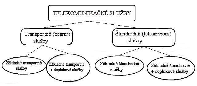 Obrázok popisujúci služby v ISDN